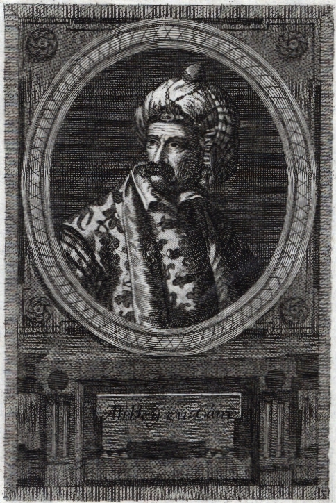 Ali Bey al-Kabir (1728-1773)